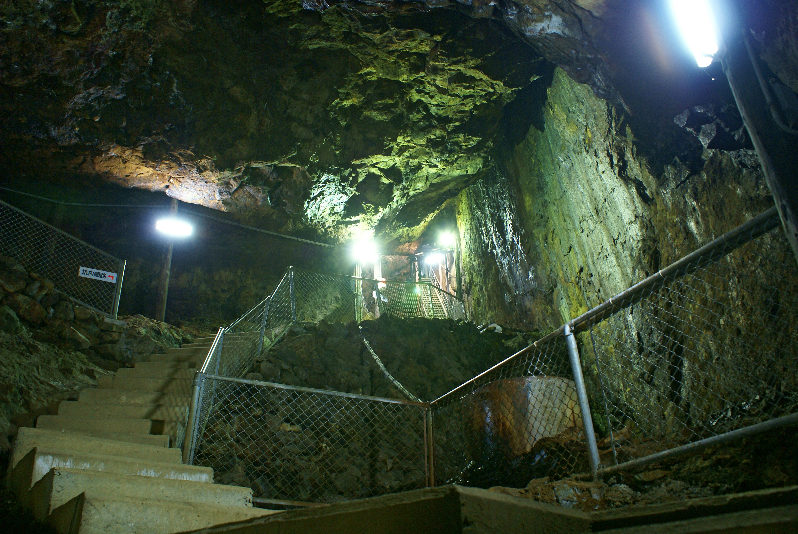 Sasaune gallery of Yoshioka copper mine, Takahashi, Okayama, Japan